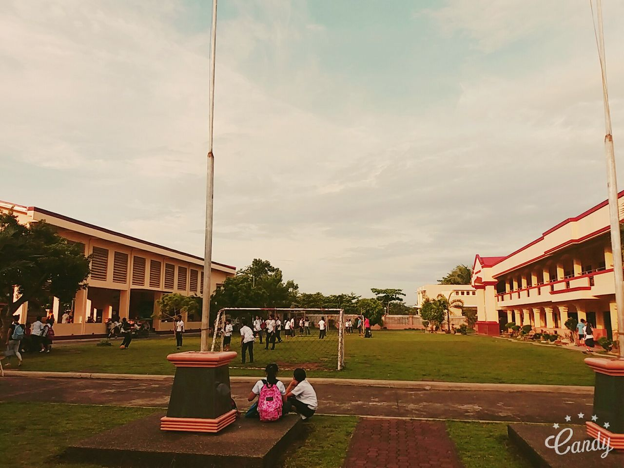 Tagalog: mga gusali sa DSC Wala pa noon ang senior high building